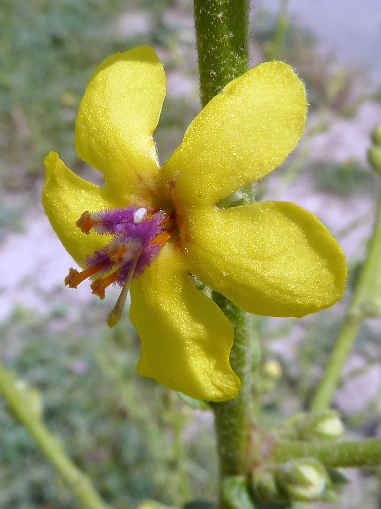 Verbascum sinuatum ( Acigutre, tientayernos) : Flor, detalle - Cruce Vereda de Orihuela con Camino de San Cayetano, Albatera (Provincia de Alicante, España).